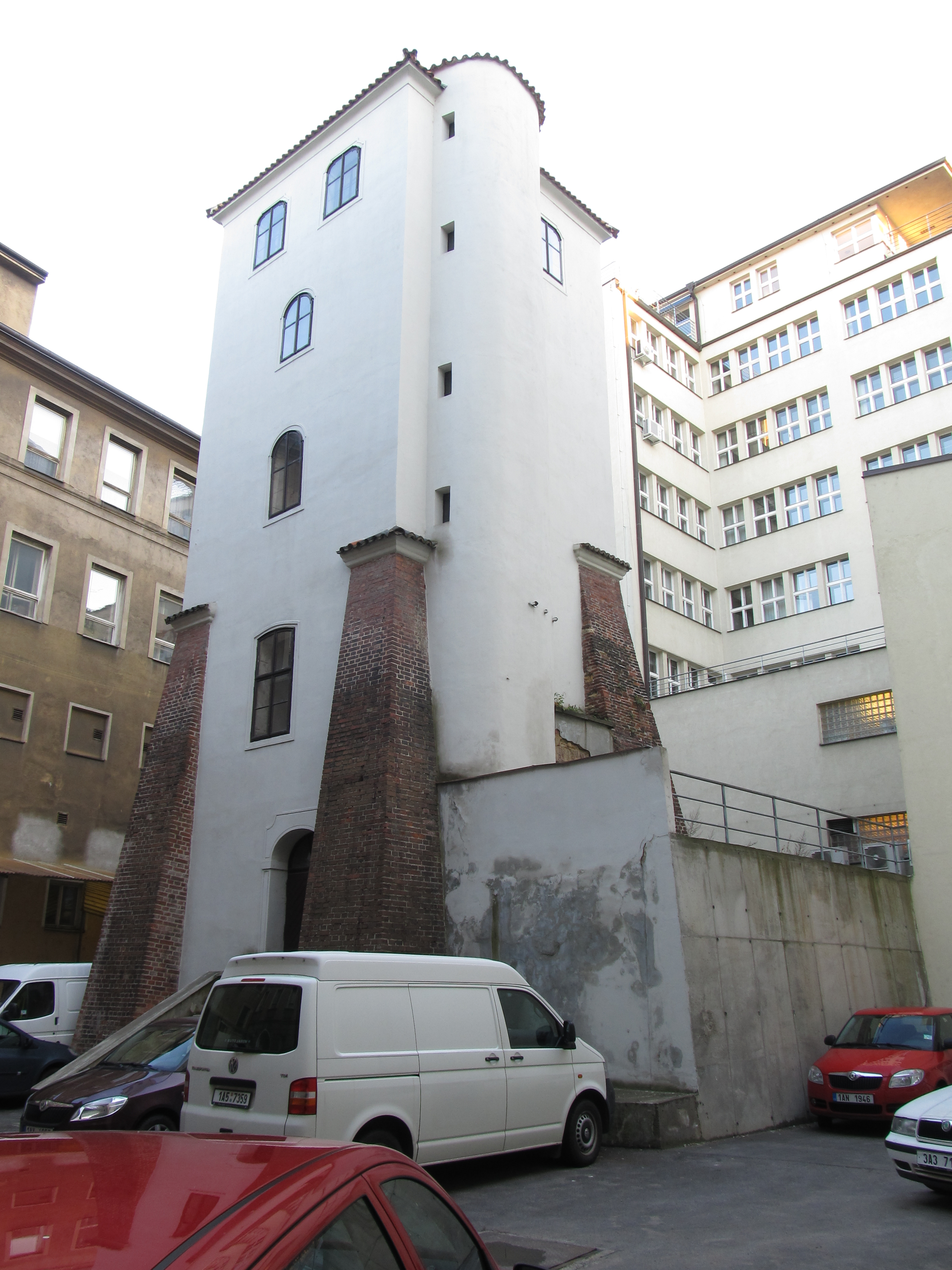 Hranolová hradební věž staroměstského opevnění ve dvoře domu v Bartolomějské ulici 4/314.